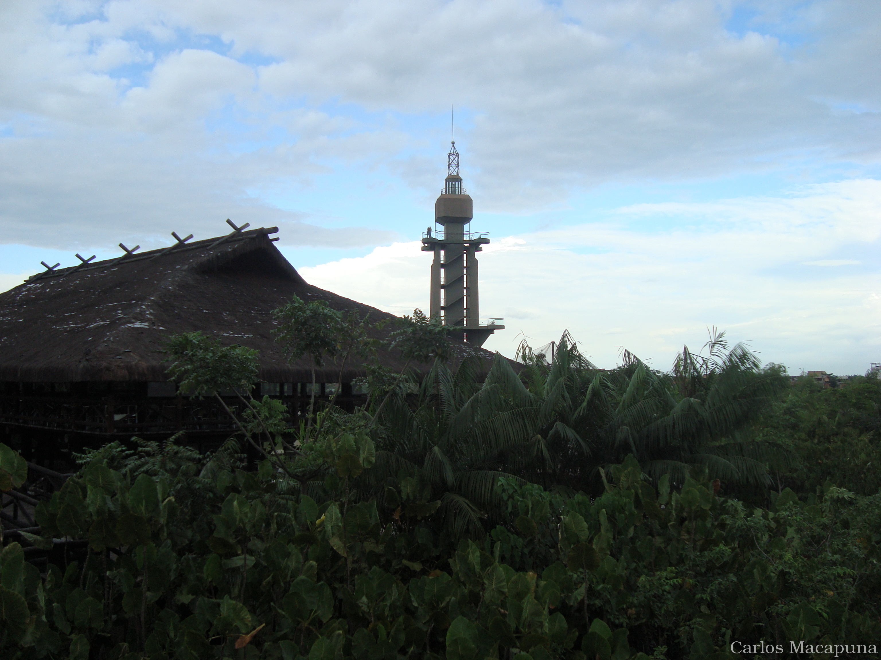 Mangal das Garças (Belém do Pará) Amazônia - Brasil --- Amazon - Brazil